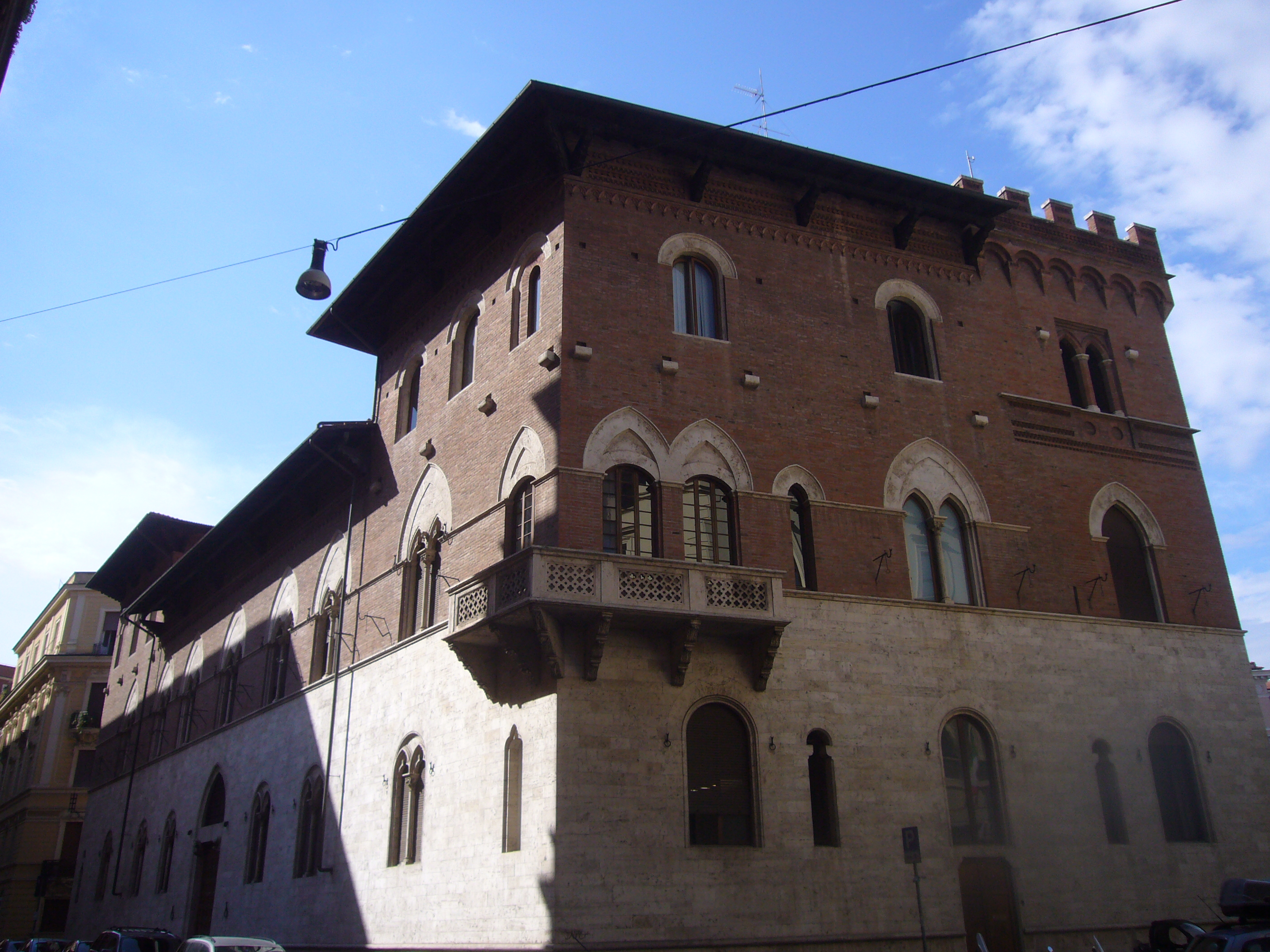 Roma, villino Maccari agli Horti Sallustiani